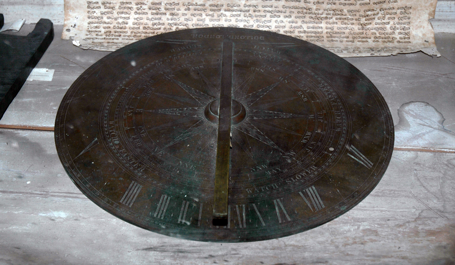 சூரியக் கடிகாரம் - தொல் பொருட்காட்சிச்சாலை, யாழ்ப்பாணம்